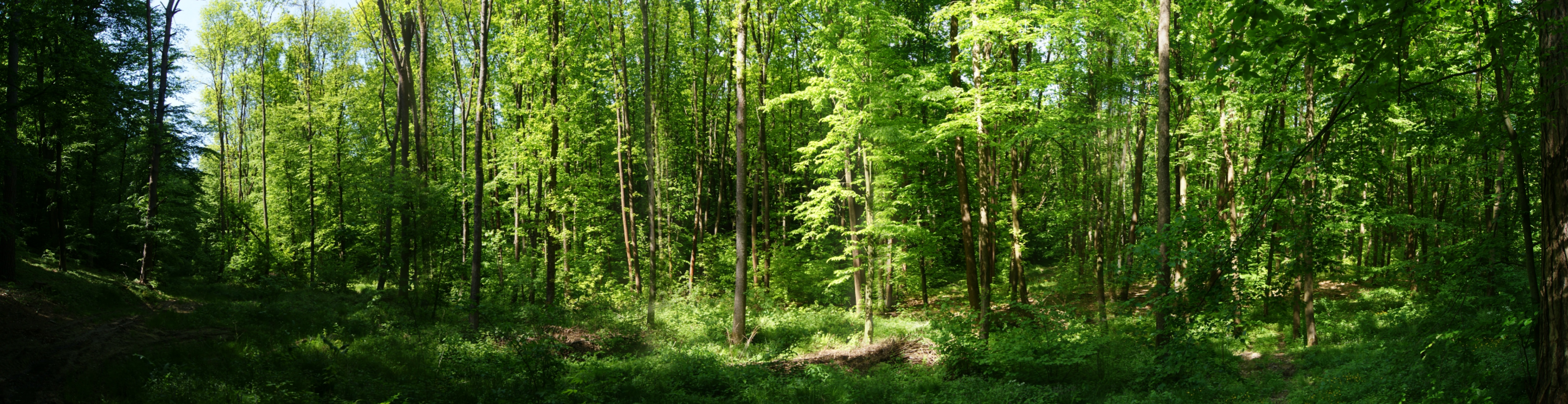 Завадівський, Жовківський та Яворівський р-ни, Завадівське л-во, кв.1-66